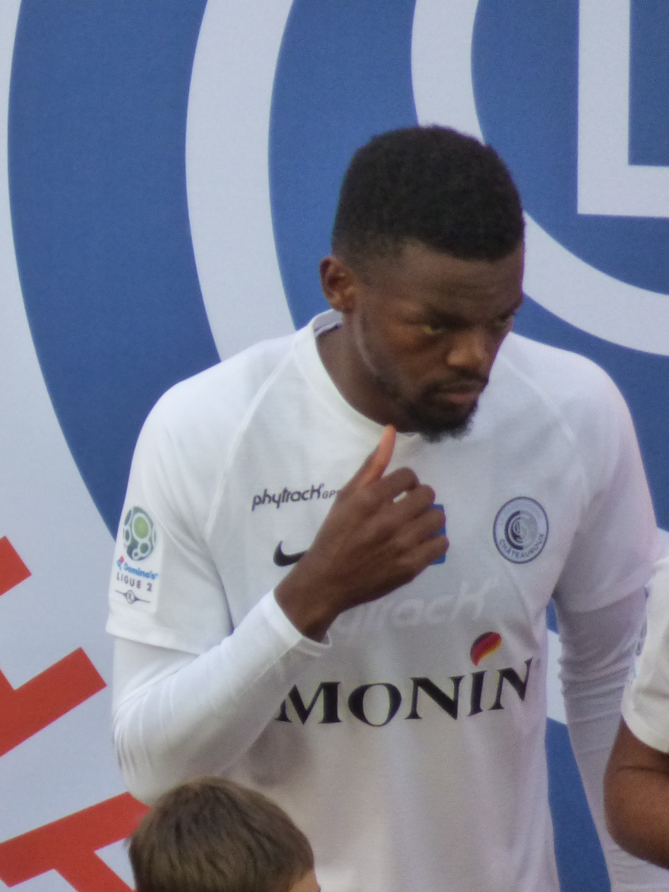 Arthur Yamga avant le match RC Lens / LB Châteauroux, le 3 novembre 2018, comportant pour la treizième journée du championnat de France de football de Ligue 2, au Stade Bollaert-Delelis.